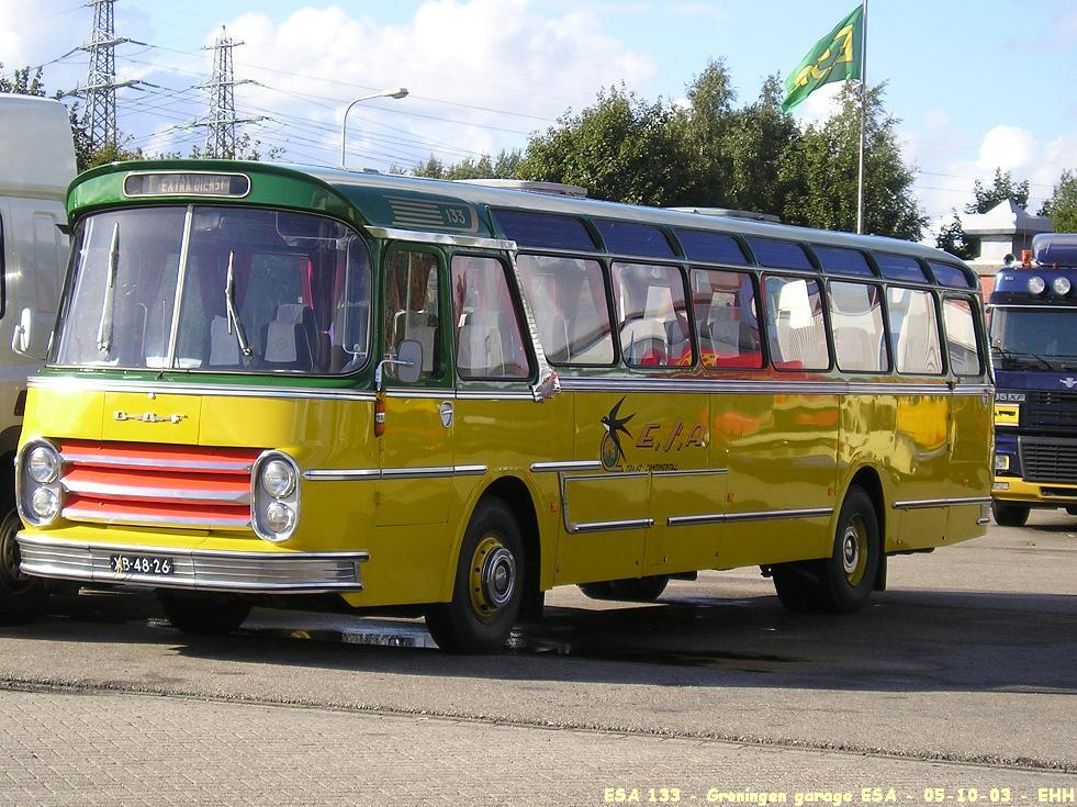 De ESA 133, Groenewold / DAF type TB163DS605 nadat hij compleet is gerestaureerd door de ESA garage in Groningen. Foto is gemaakt op 05-10-2003